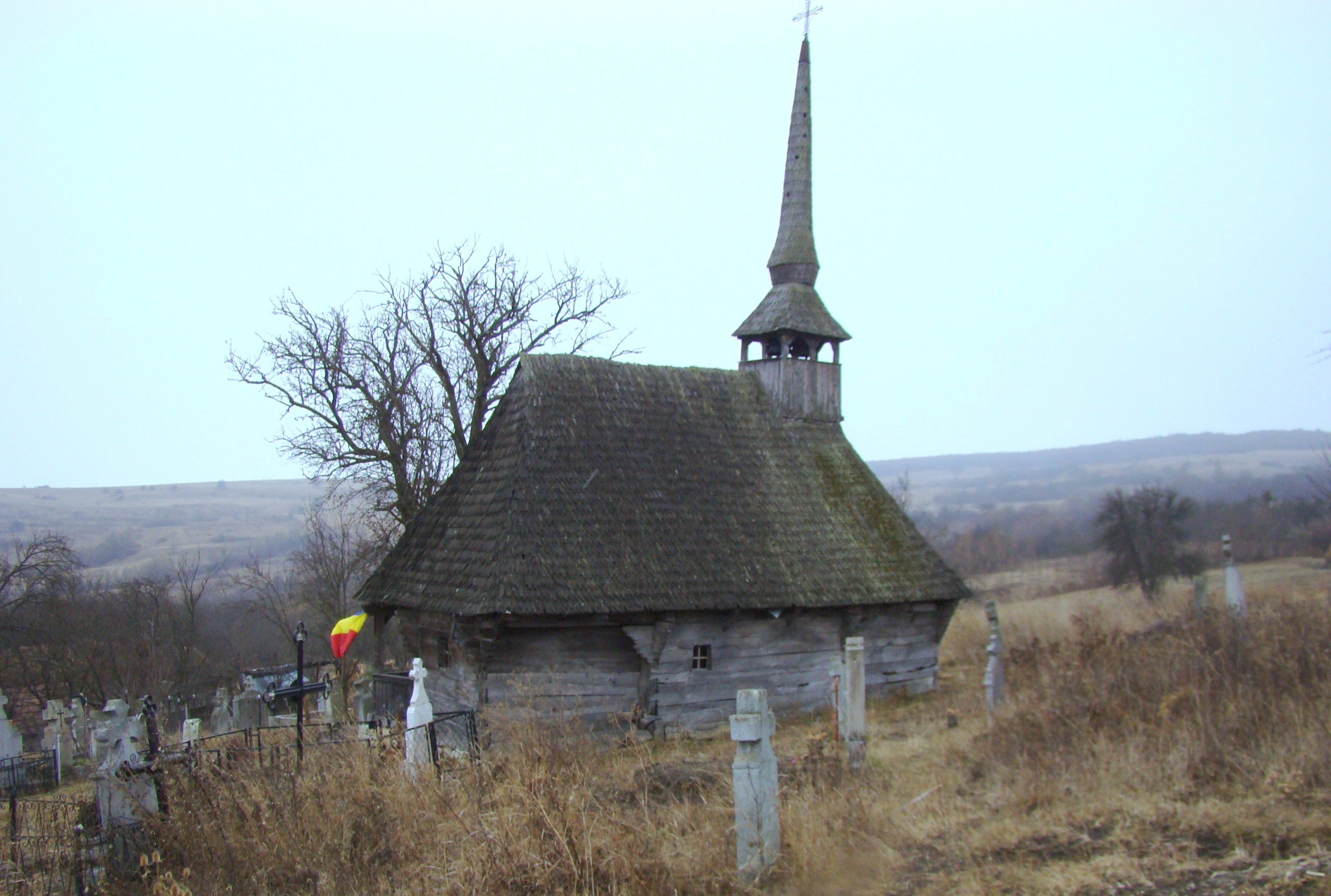 Biserica de lemn „Înălţarea Sfintei Cruci" din Pruneni